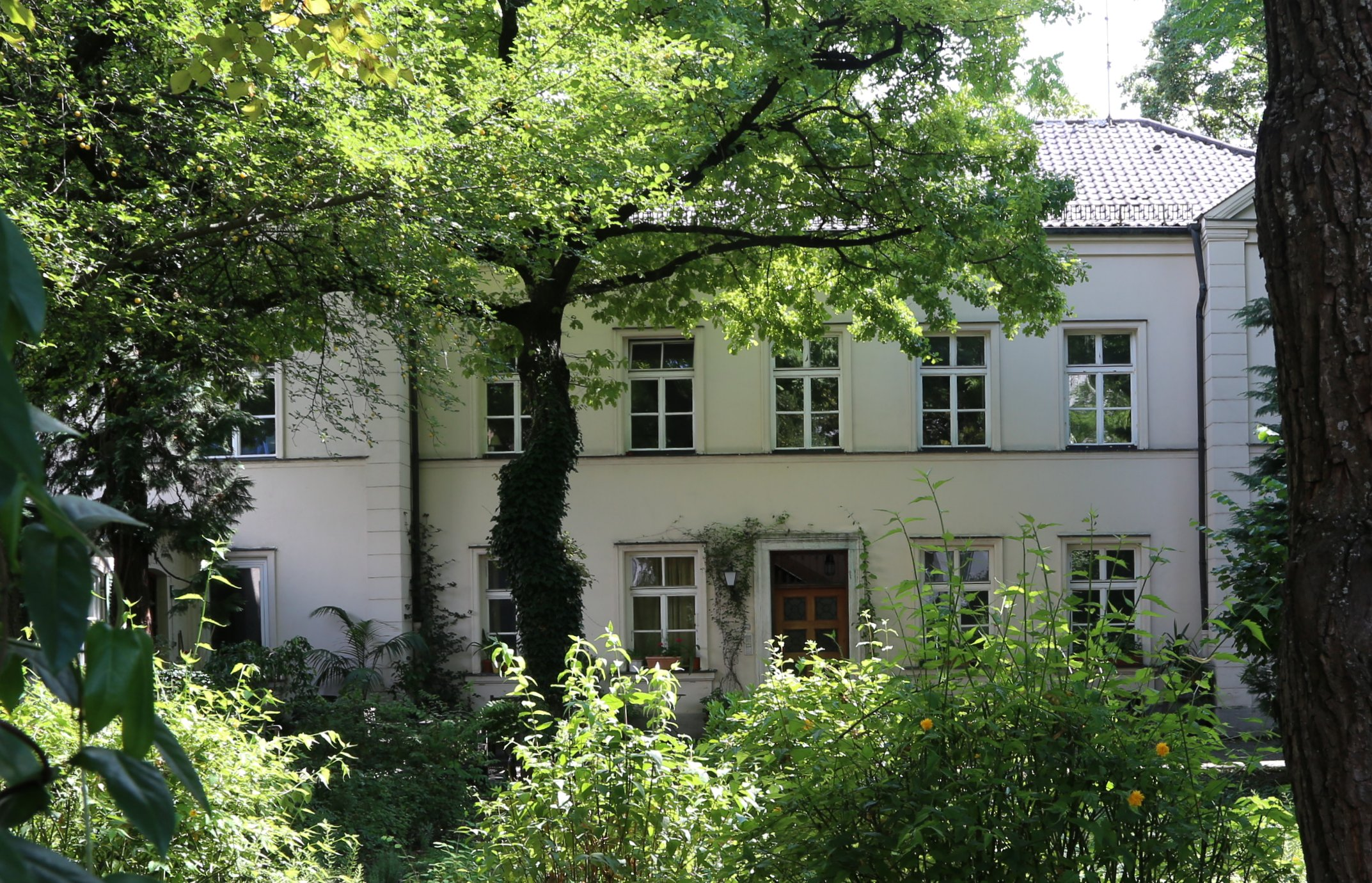 Luisenstraße 22; ehem. Wohnhaus des Dichters Paul Heyse, villenartiger Neurenaissancebau in Garten, 1872–74 von Gottfried von Neureuther; nach Kriegsschäden z. T. vereinfacht.